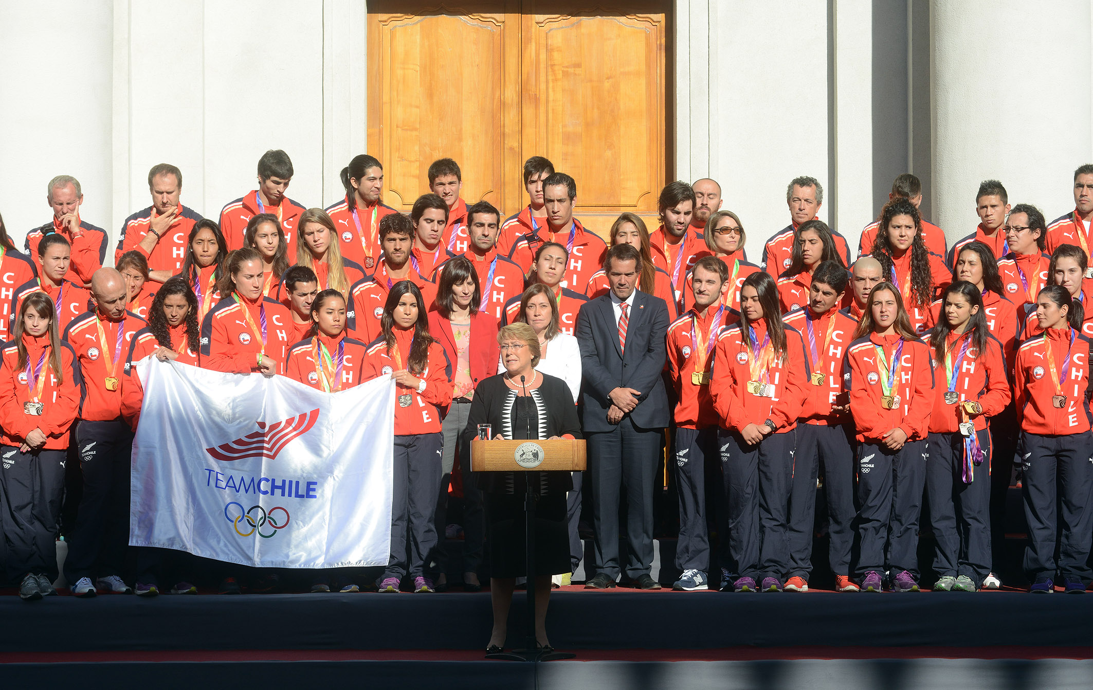 Presidenta Michelle Bachelet recibe en La Moneda a medallistas de los Juegos Odesur Santiago 2014.